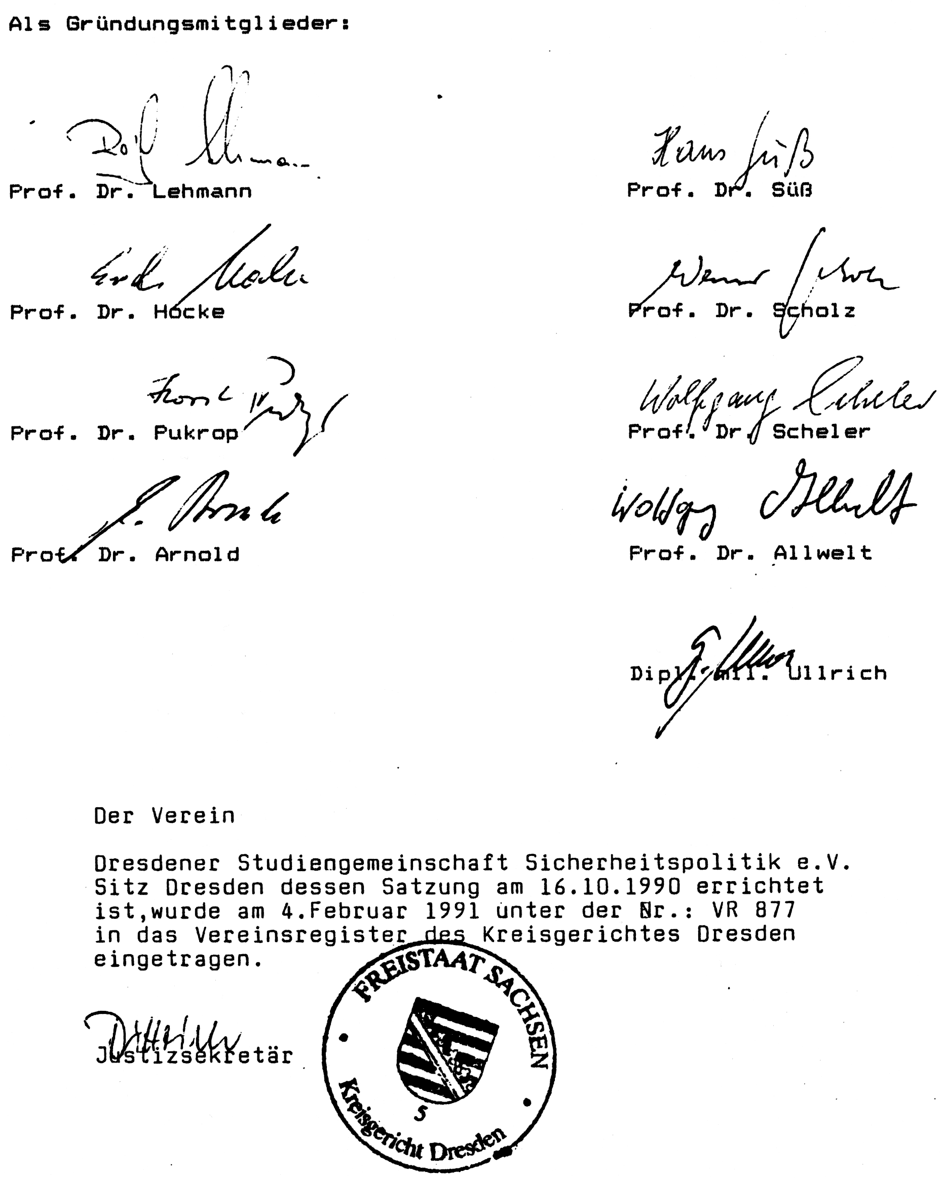 Gründungsurkunde der DSS e. V. (Auszug), Kopie m. amtl. Vermerk.